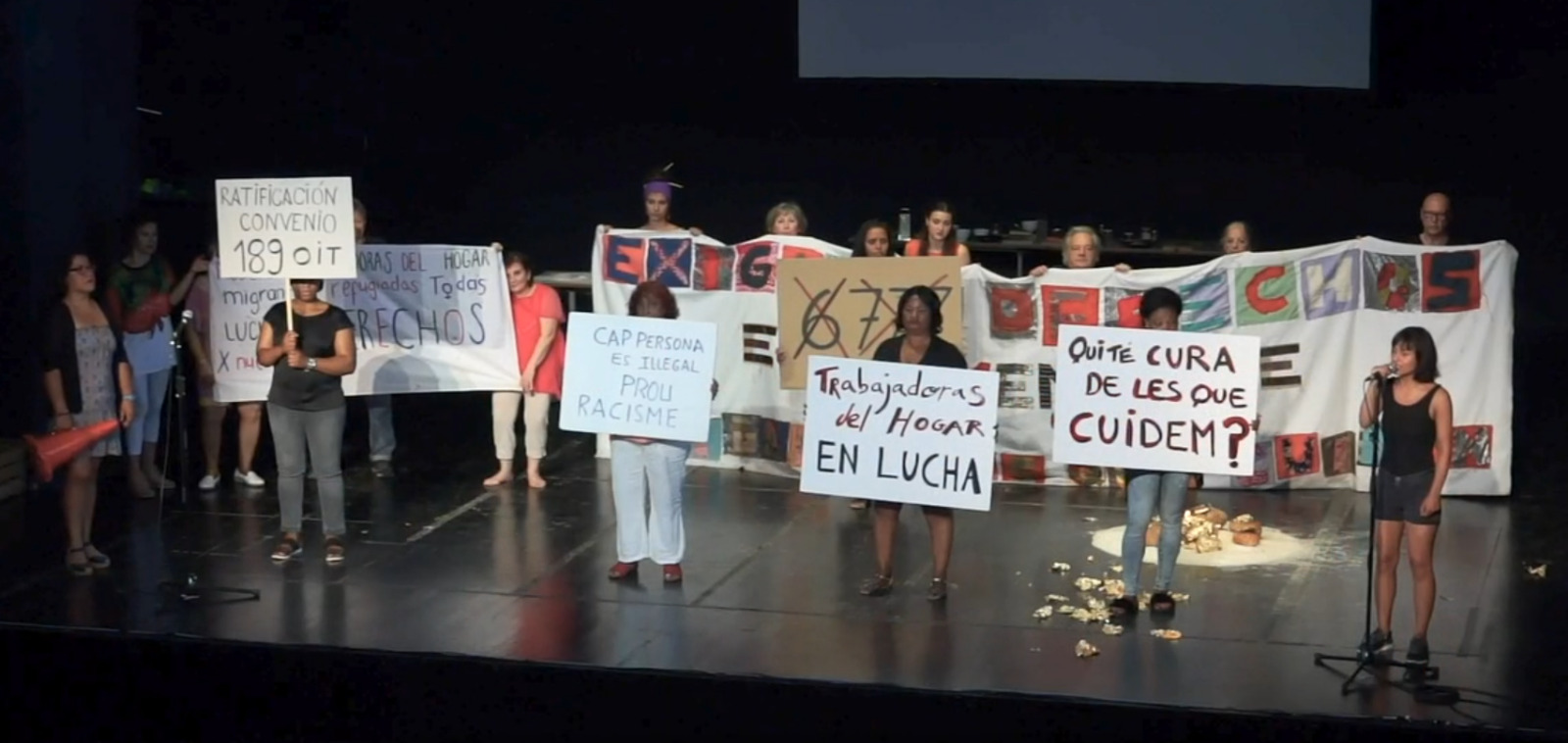 En esta foto vemos una captura de una de las escenas de Rebomboris donde las compañeras de sindillar reivindican sus hechos como trabajadoras del hogar y los cuidados.